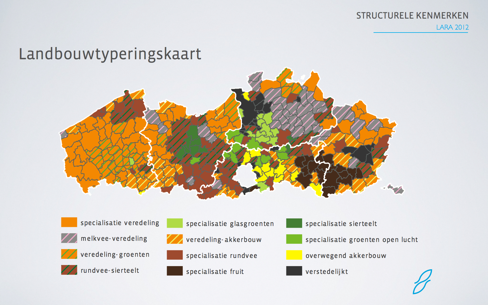 Landbouwtyperingskaart, Vlaanderen, 2010